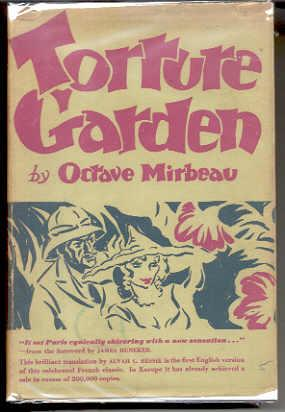 couverture de Torture Garden, d'Octave Mirbeau (1848-1917)